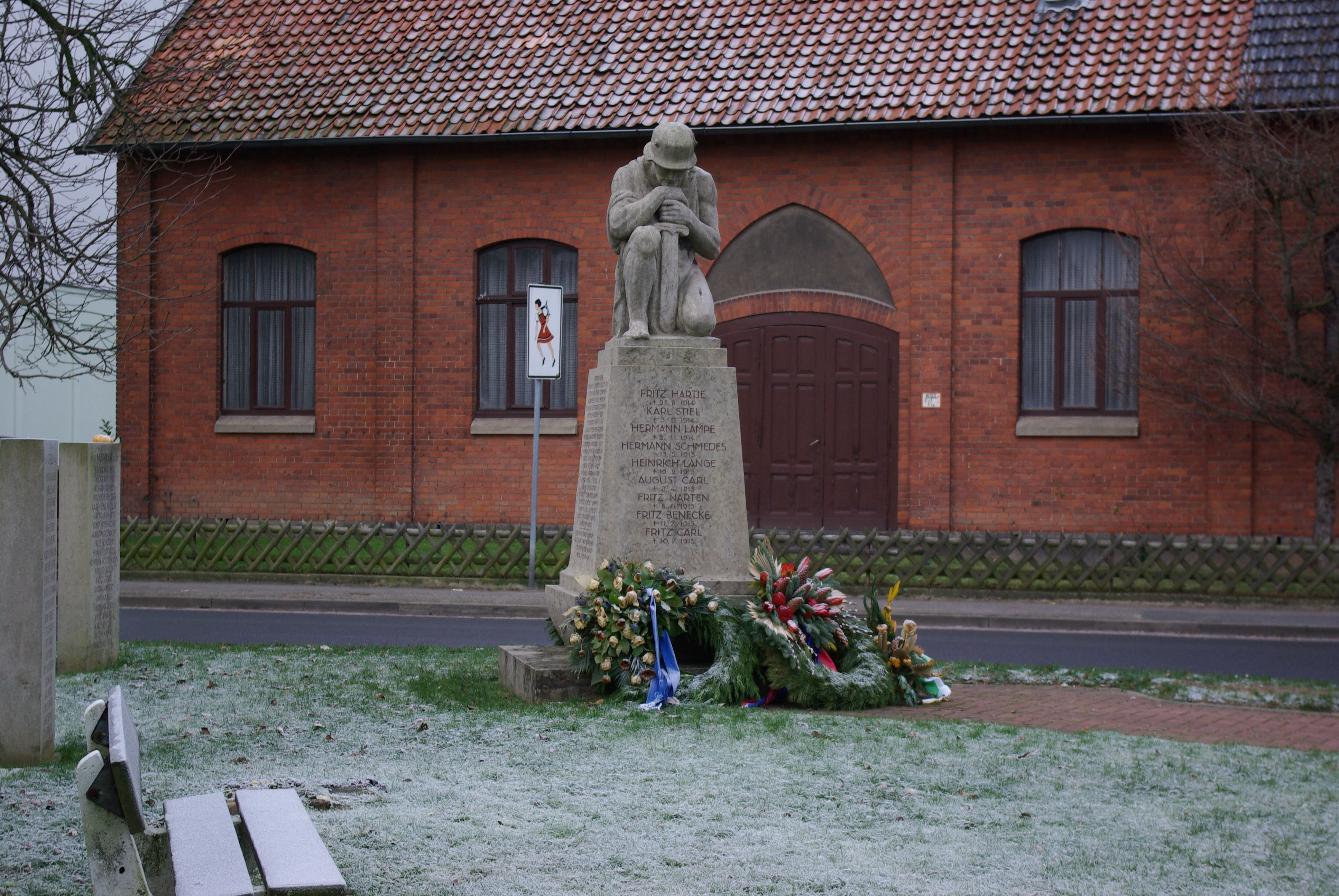 Hemmingen, Niedersachsen, Ortsteil Harkenbleck, das Kriegerdenkmal